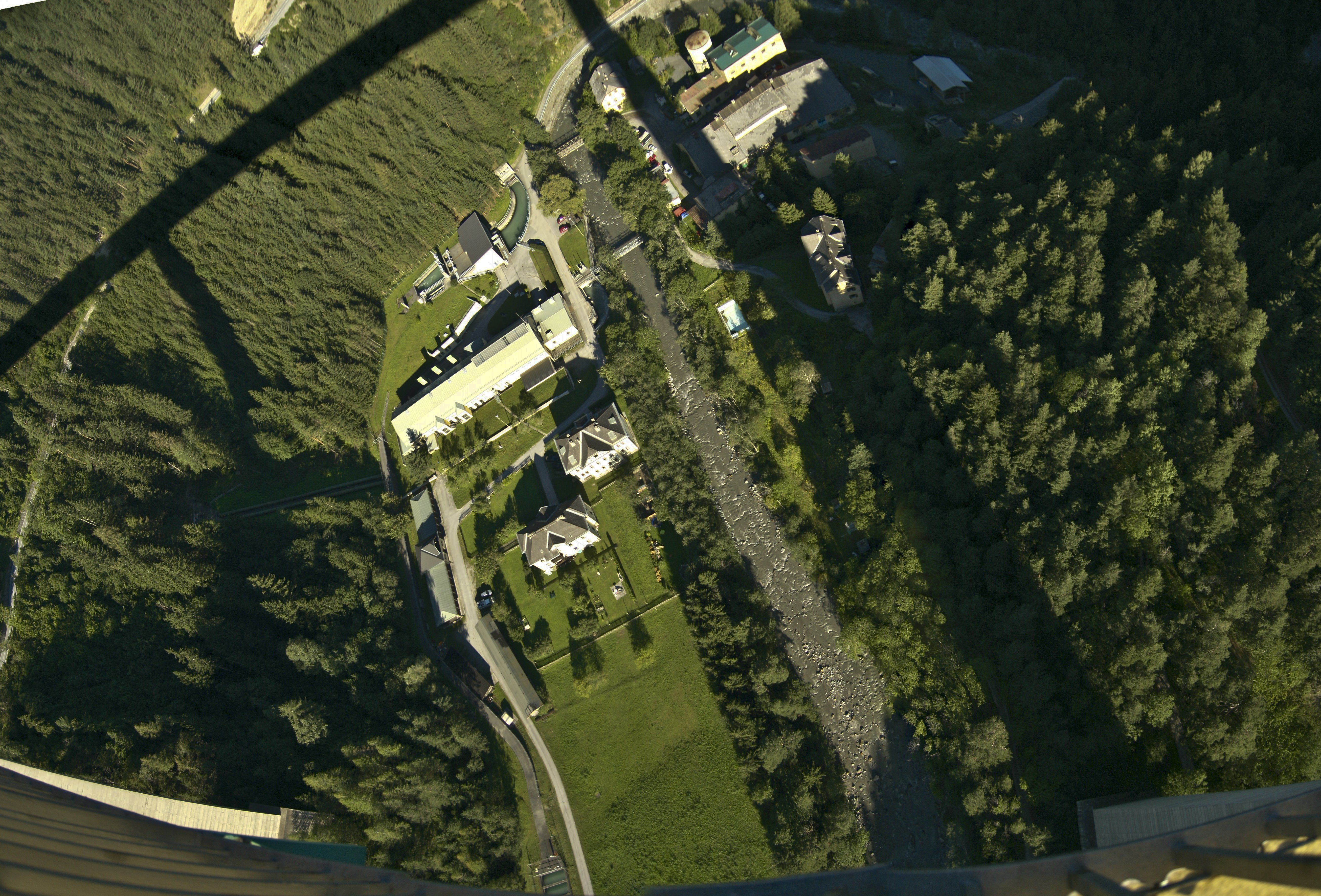 Europabrücke Blick in der Mitte nach unten